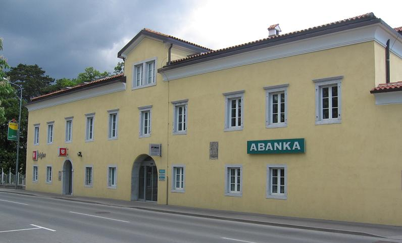 Sežana, Stari grad (Old Castle)